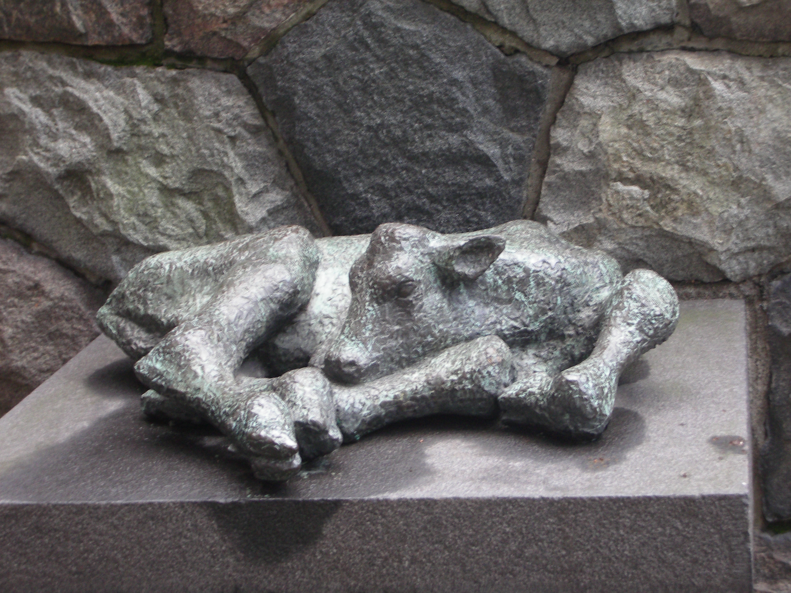 Asmund Arles Liggande kalv, Västertorps centrum, Stockholm. Asmund Arle´s Calf lying down or Newborn calf bronze 1952, Västertorp Centre, Stockholm.